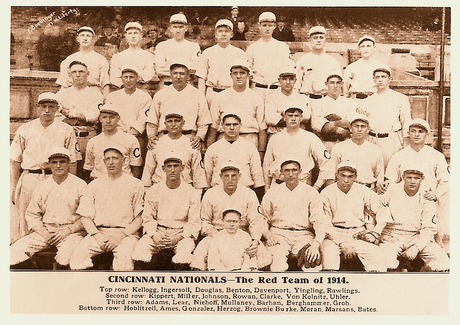 1914 Cincinnati Reds